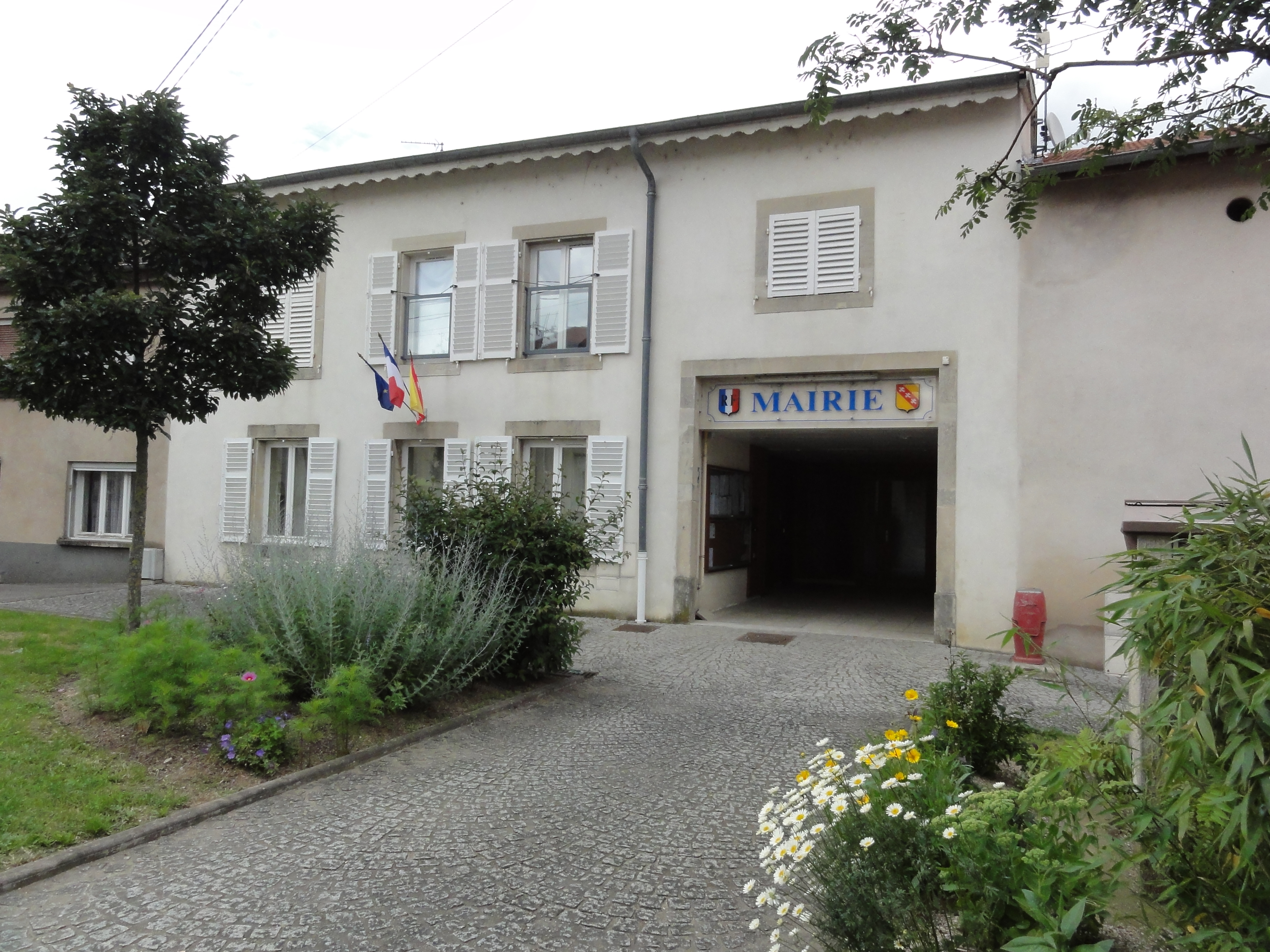 Vélaine-sous-Amance (M-et-M) mairie